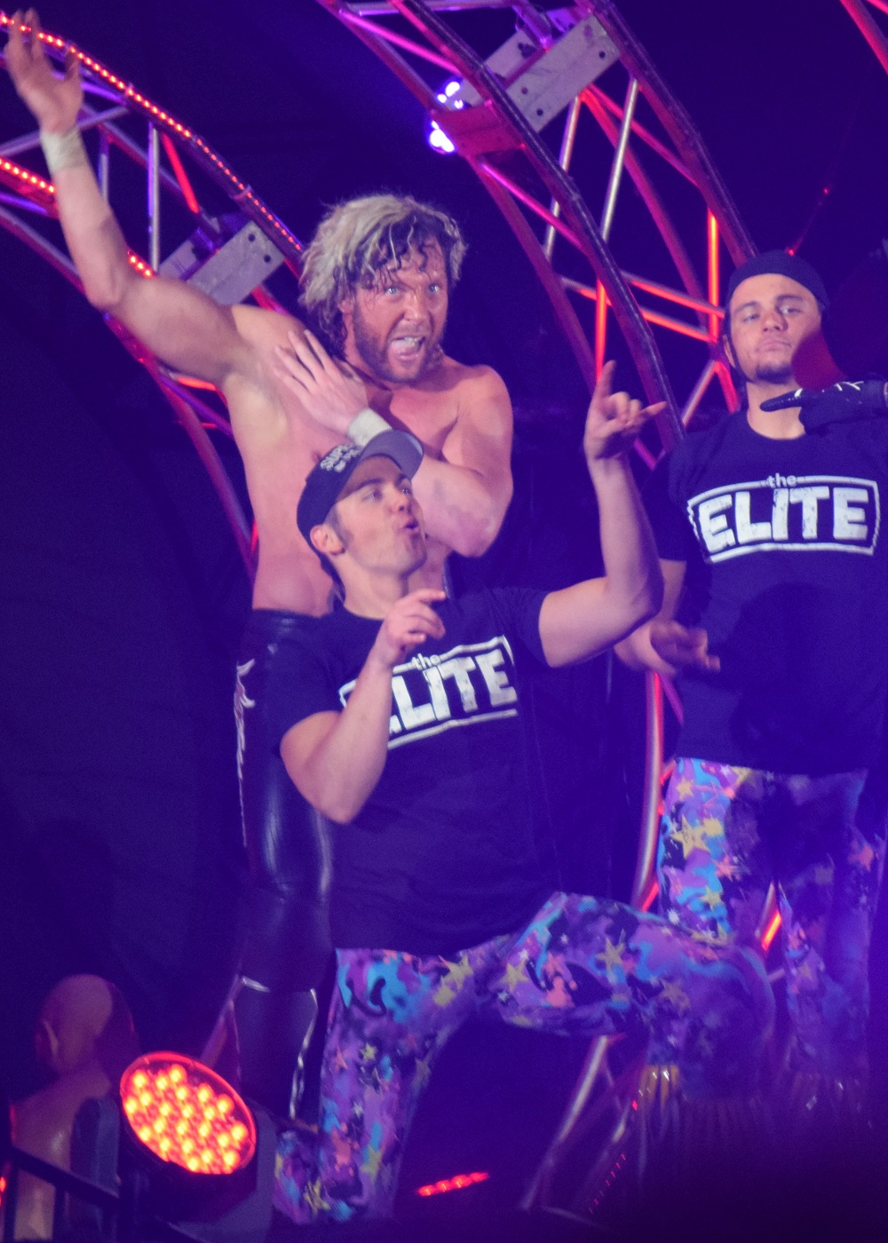 2016年2月11日 大阪府立体育会館 「THE NEW BEGINNING in OSAKA」 ジ・エリート（ケニー・オメガ & マット・ジャクソン & ニック・ジャクソン）